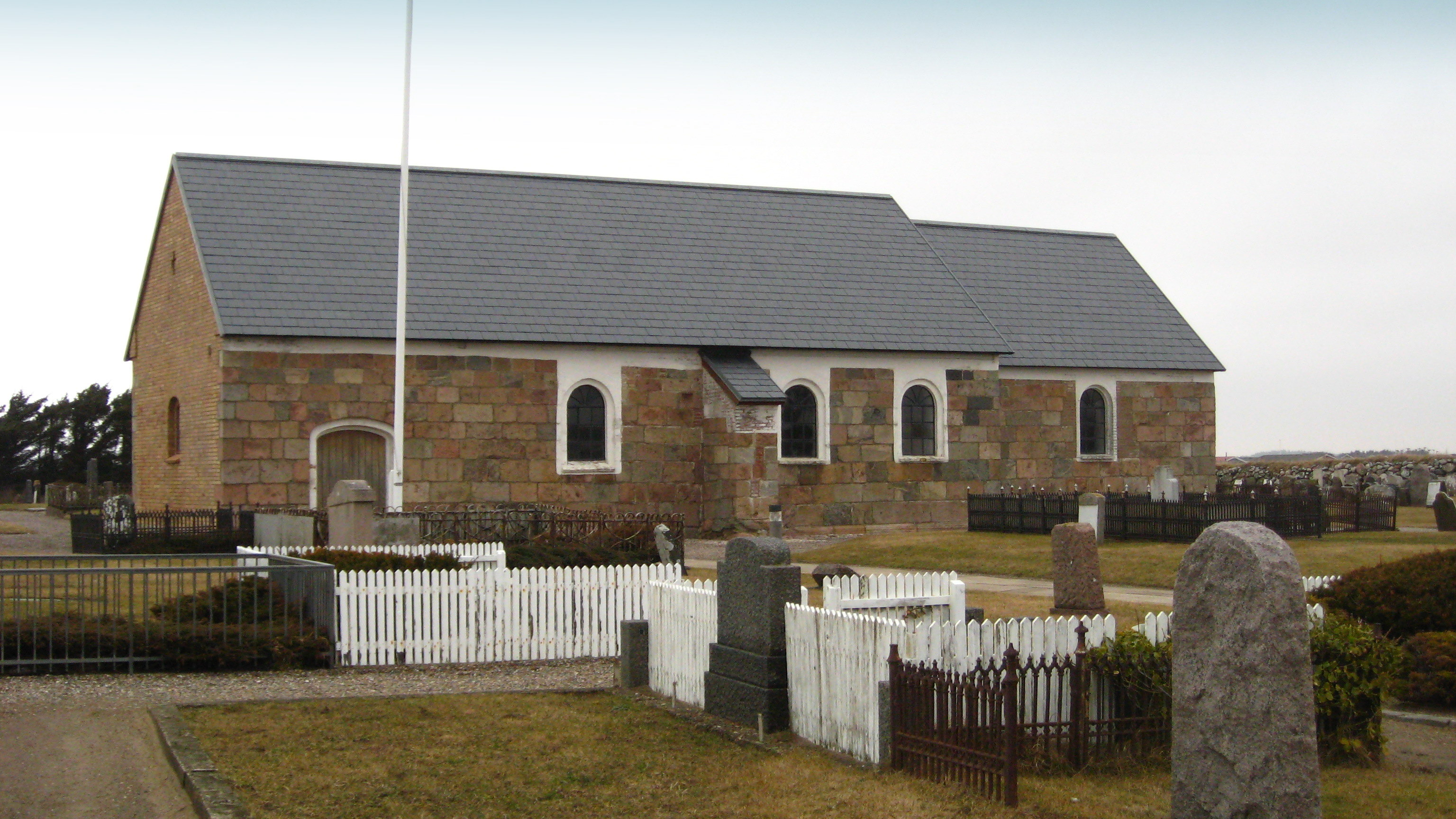 Furreby Kirke (Løkken-Furreby Sogn « Hjørring Søndre Provsti « Aalborg Stift )